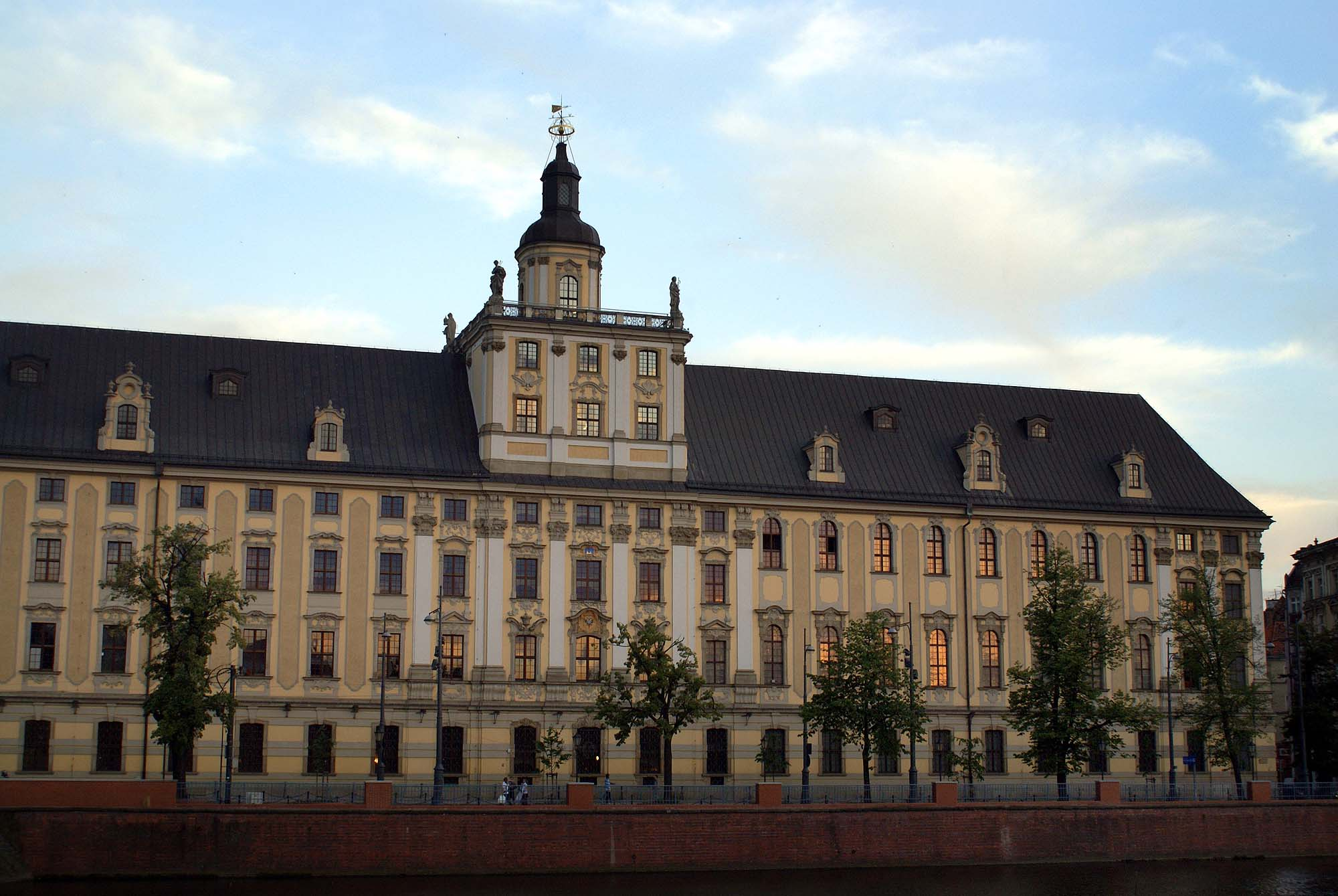 Wrocław, kolegium jezuickie, ob. Uniwersytet Wrocławski